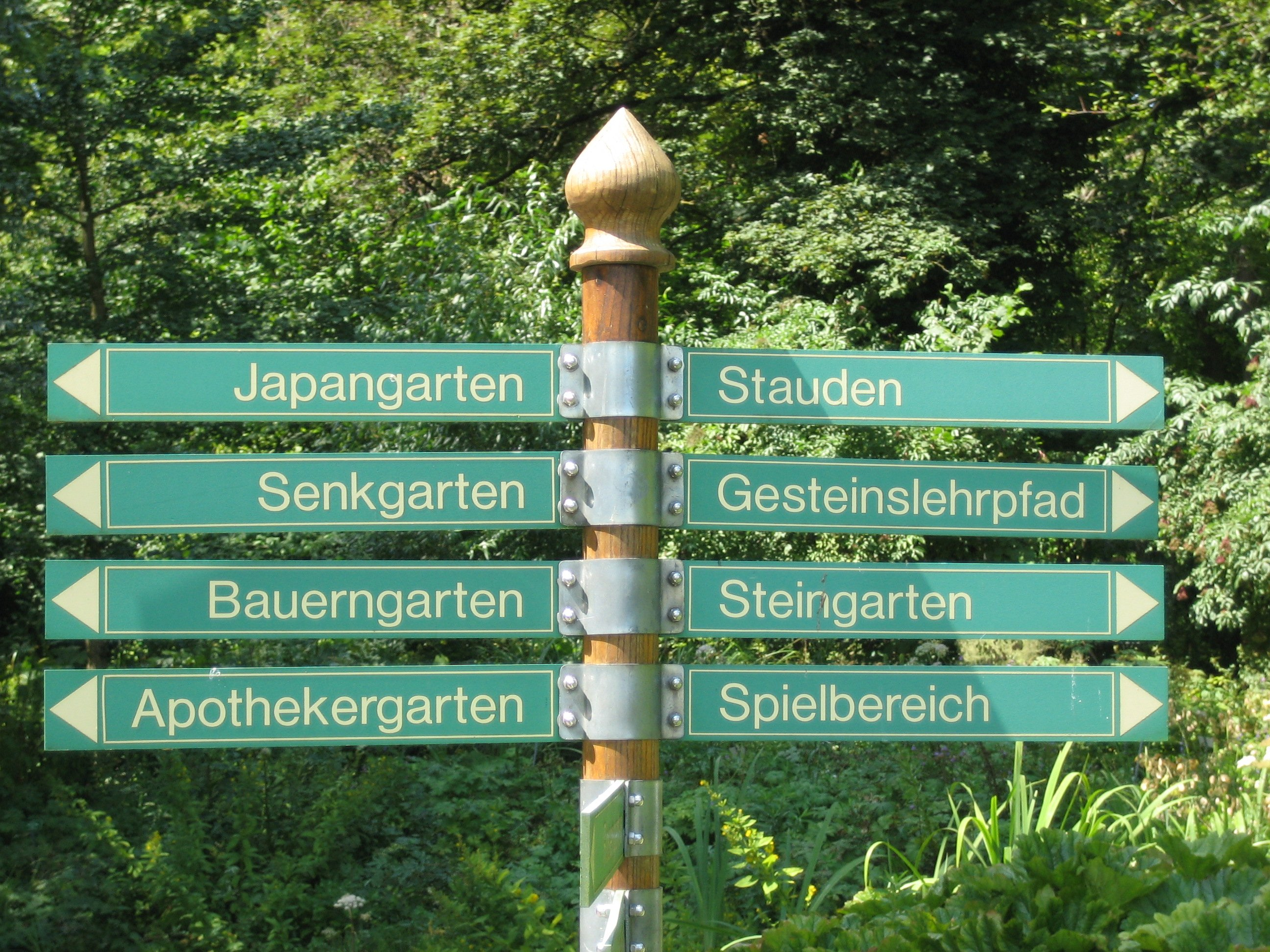 Botanischer Garten in Augsburg, Wegweiser für Besucher